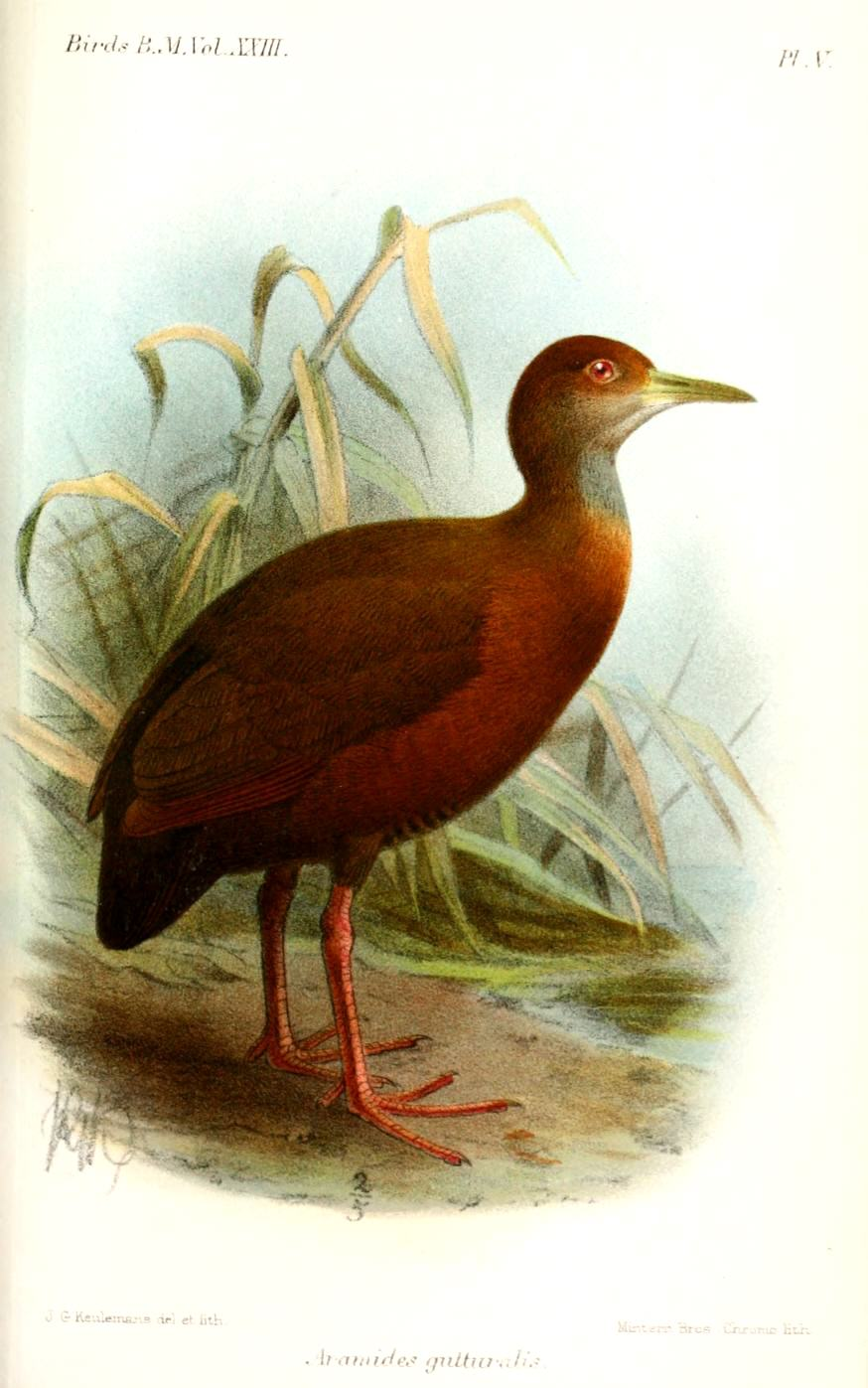 "Aramides gutturalis" = Aramides cajaneus